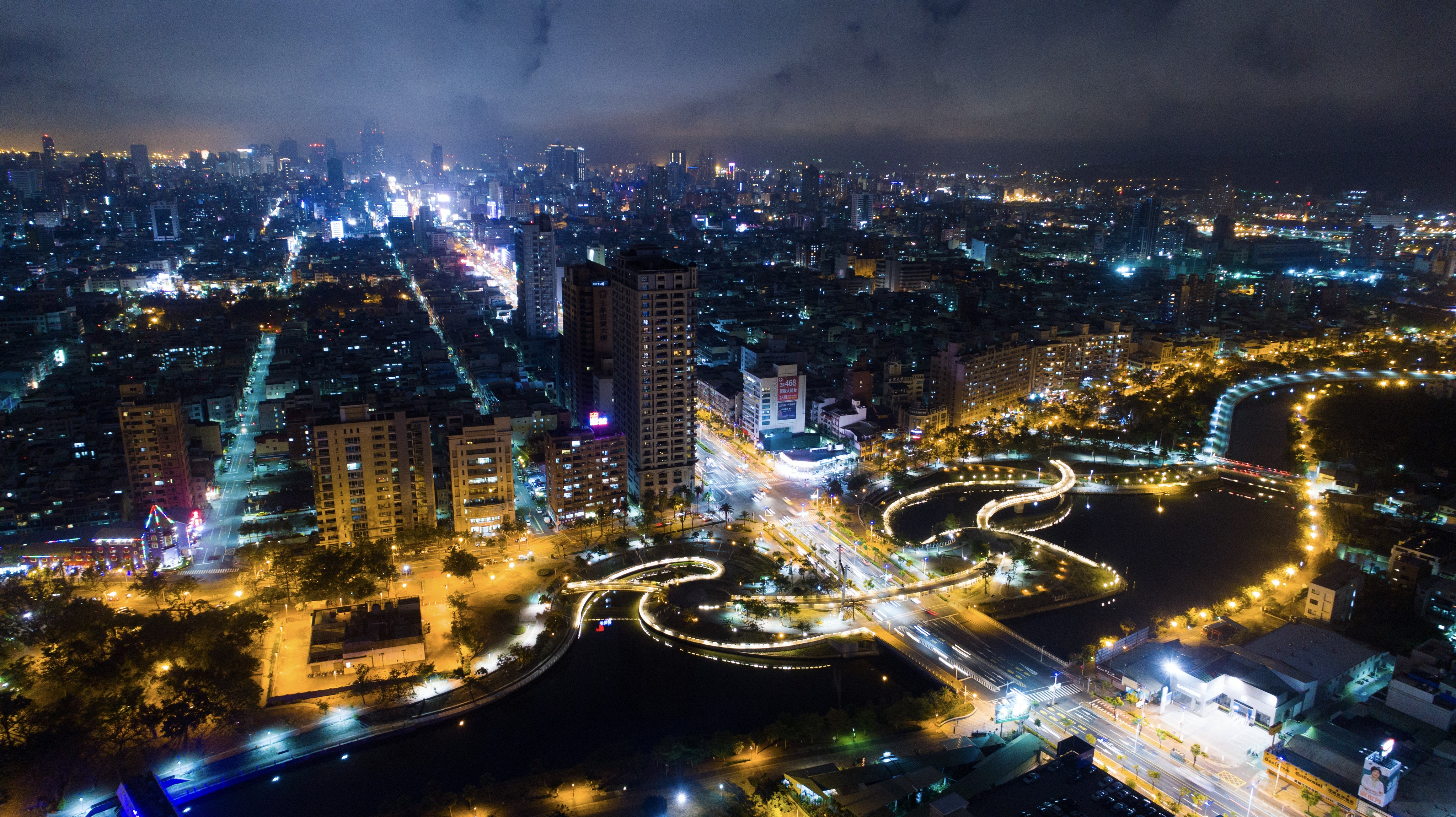 中文（台灣）: 愛河之心全景